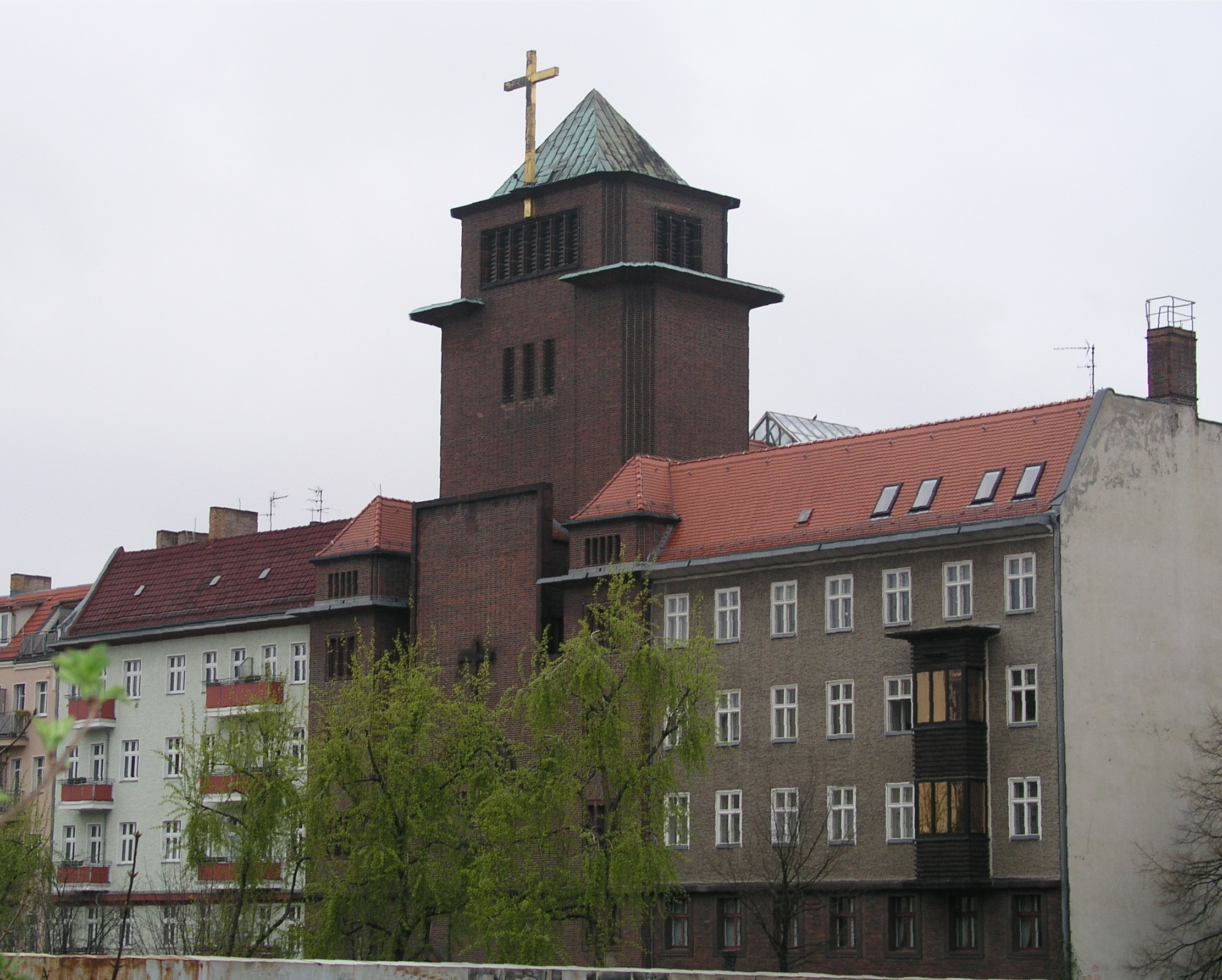 Kirche St. Augustinus und Pfarrhaus (3)